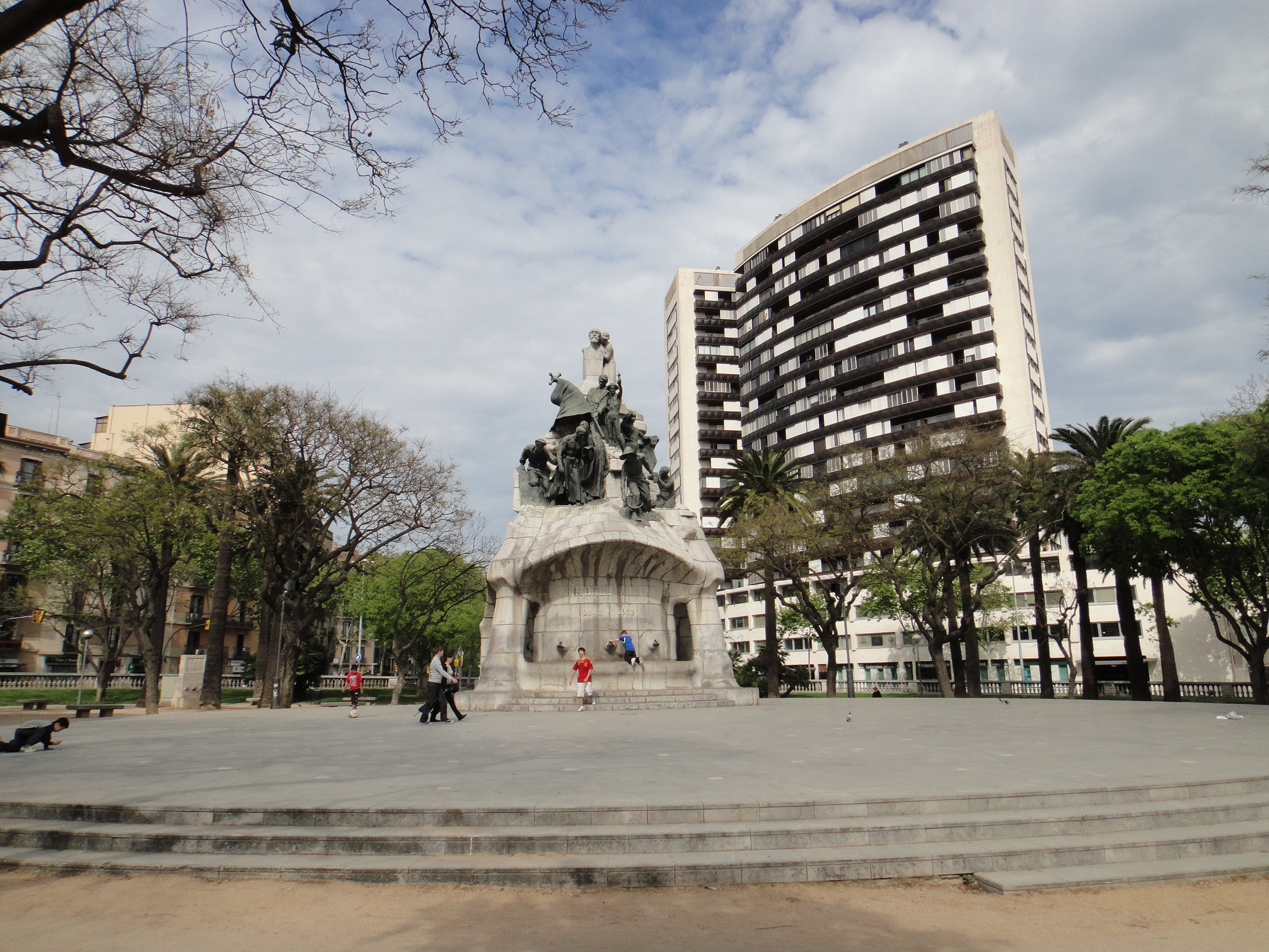 barcelona